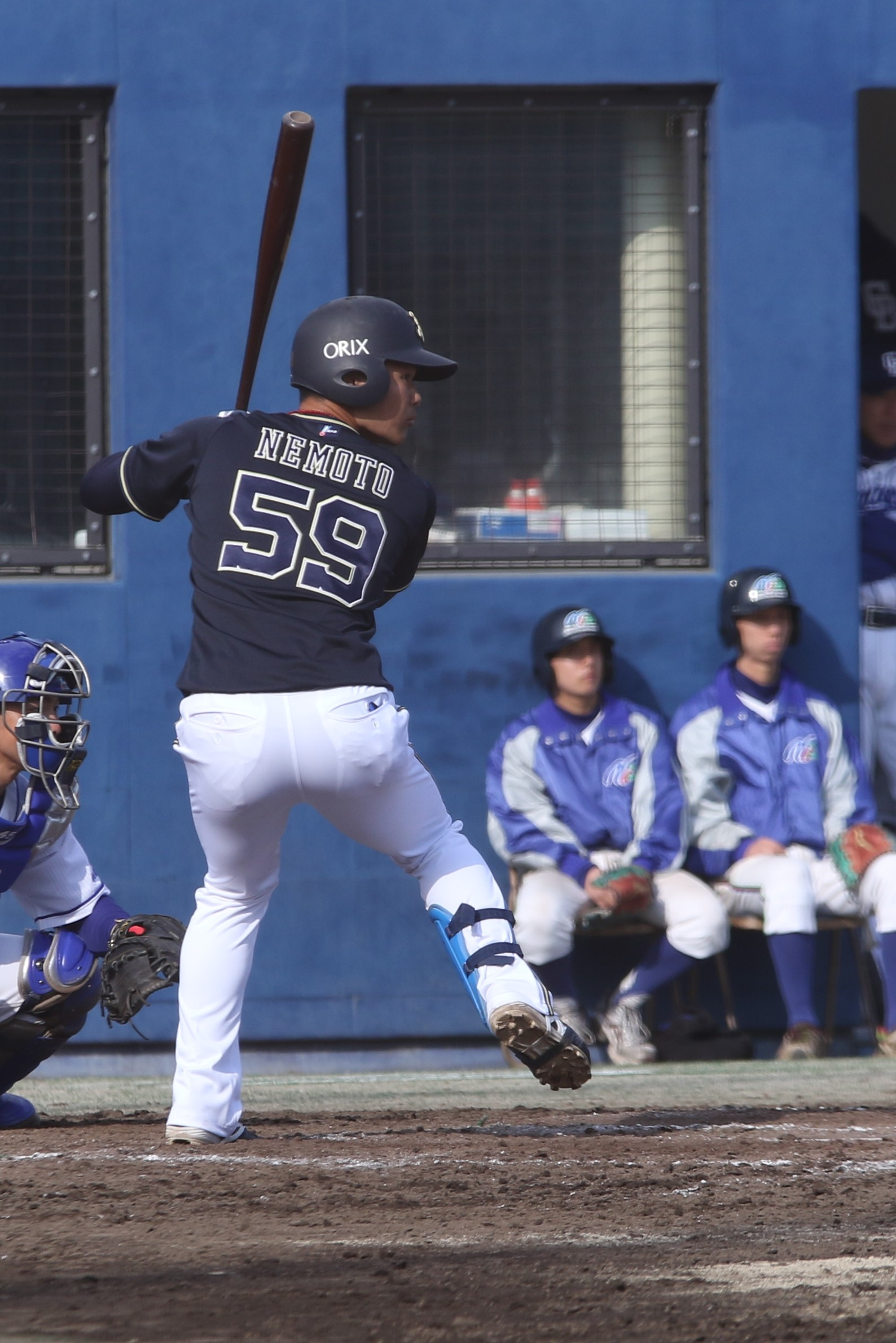 2019年3月17日、ナゴヤ球場にて